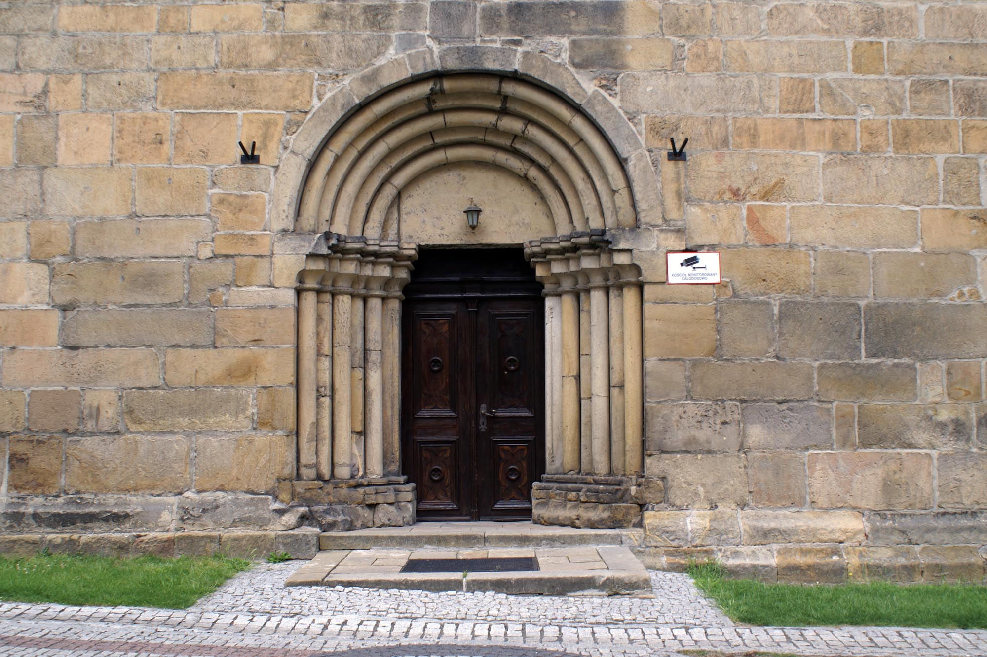 Złotoryja - wejście do kościoła Narodzenia NMP